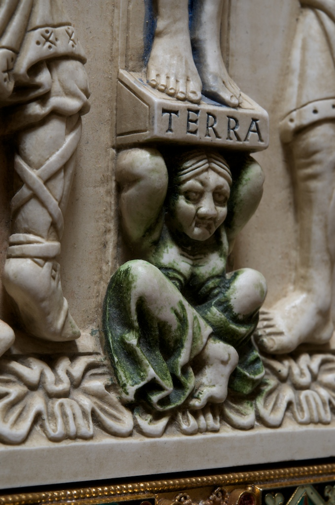 Detail af Codex Aureus Epternacensis ("Terra").